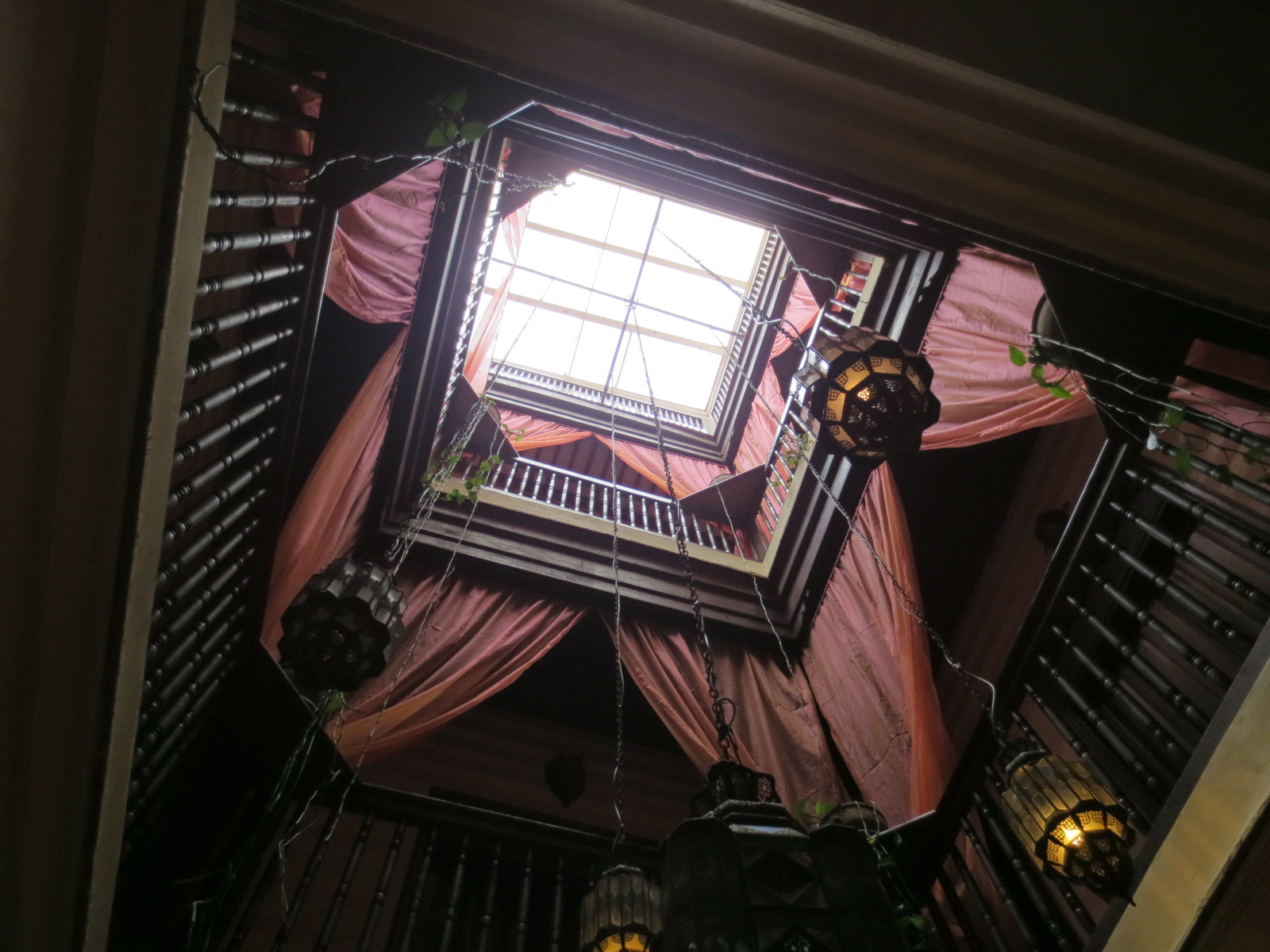 Riad au Maroc in Essaouira